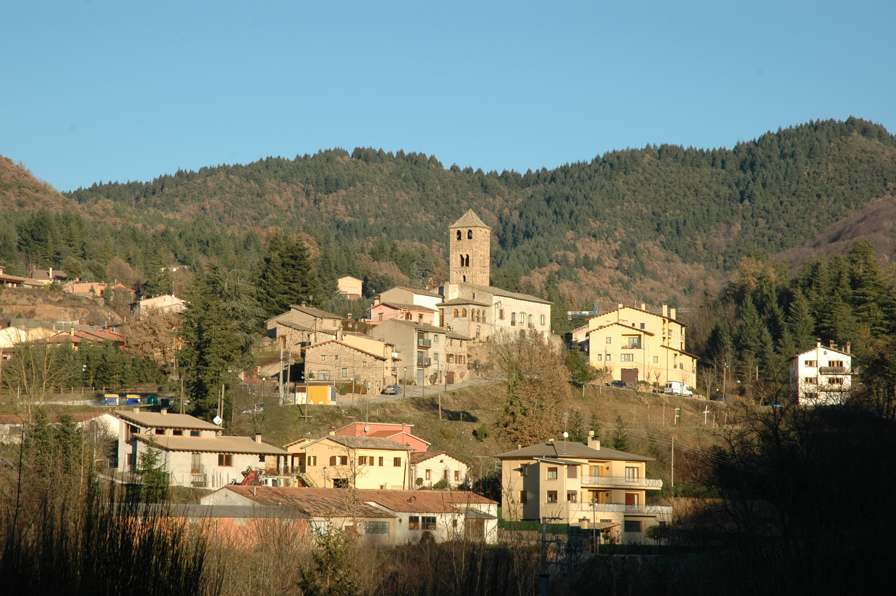 Espinelves